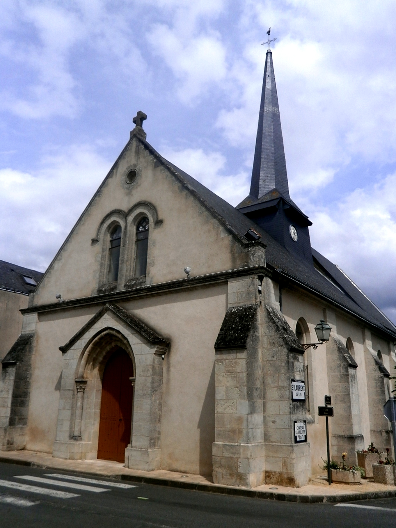 L'église de Saint-Laurent-de-Lin